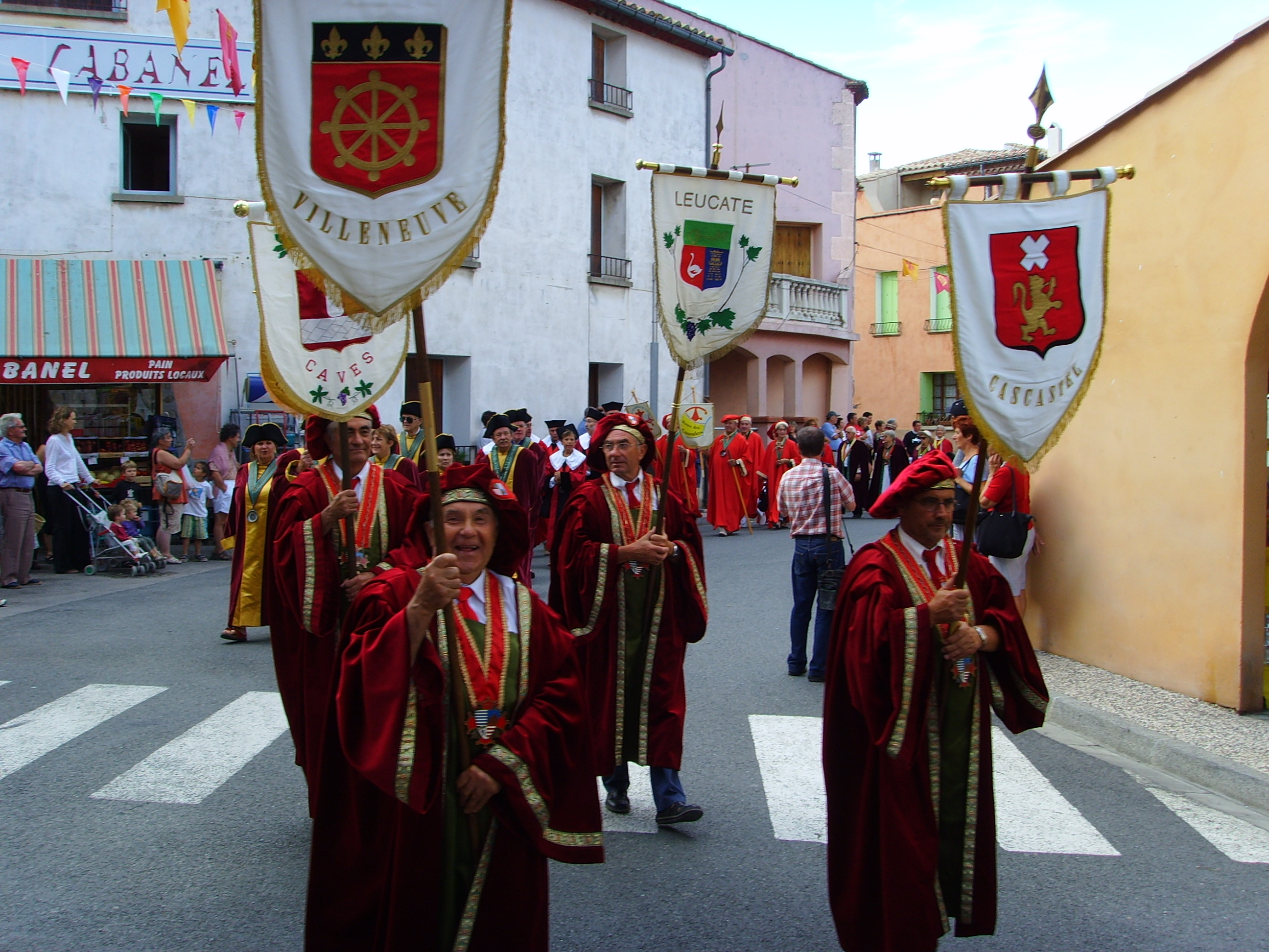 Paziols, Département Aude, France: procession of the "dignitaries" La fete vigneronne de l'Ete, 04. aout 2006 author: Gerbil